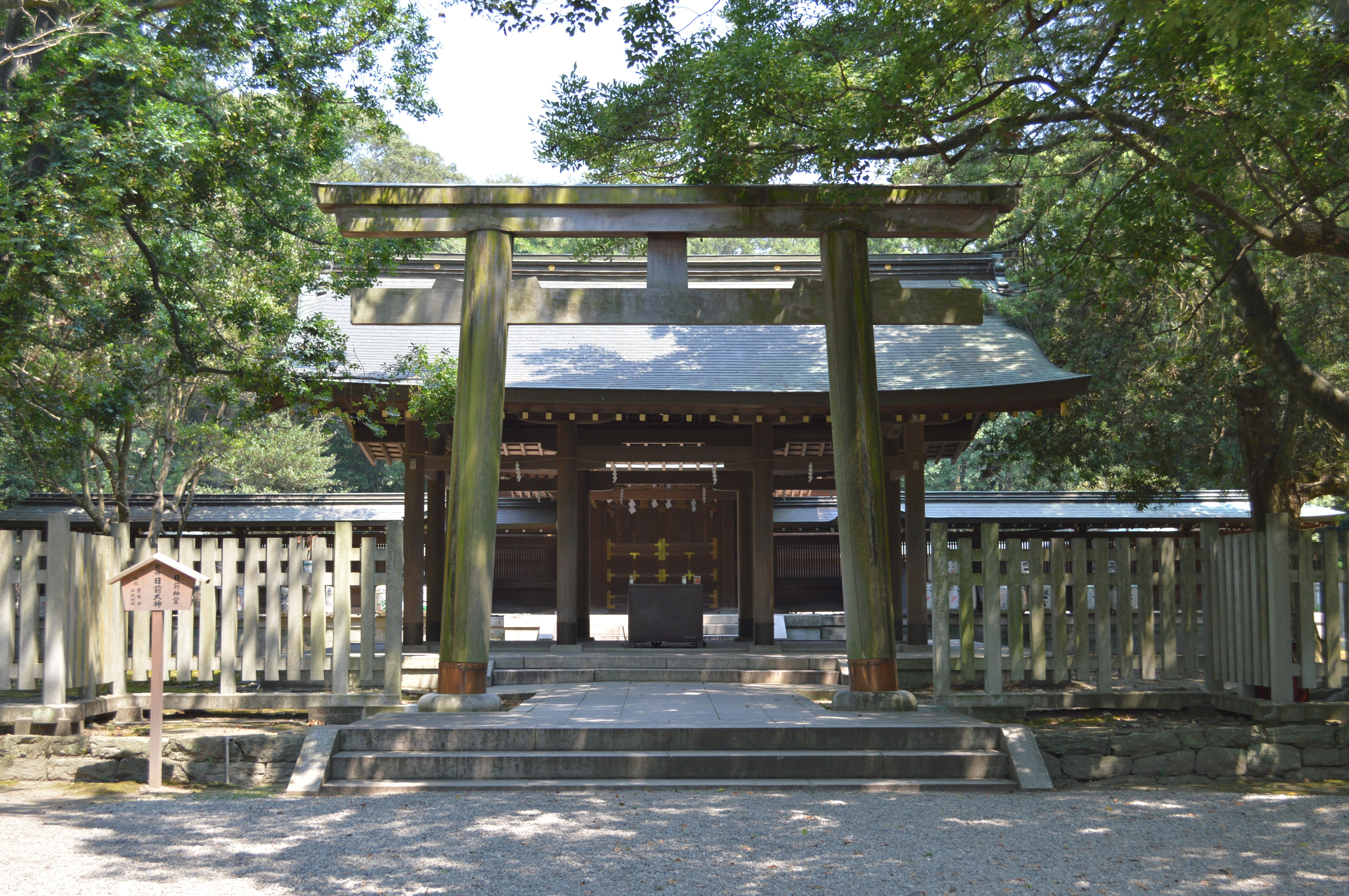 日前神宮 鳥居